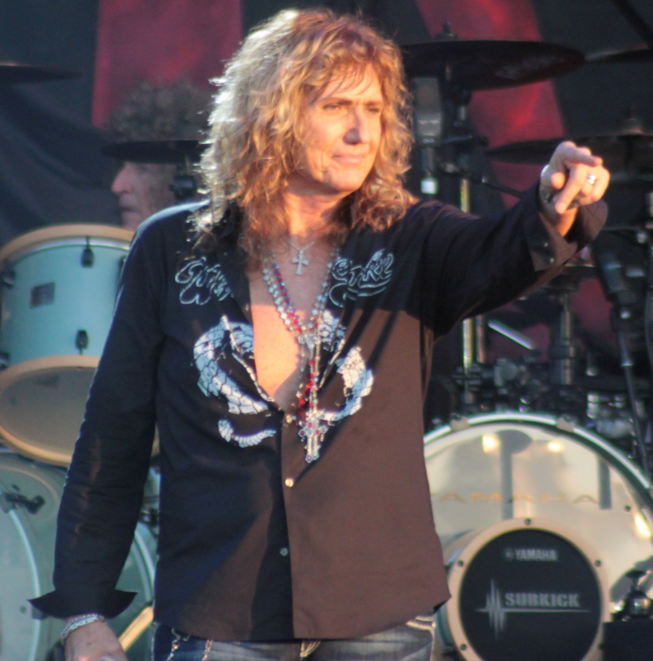 David Coverdale, Whitesnake, Hellfest 2013, Fr-44-Clisson.